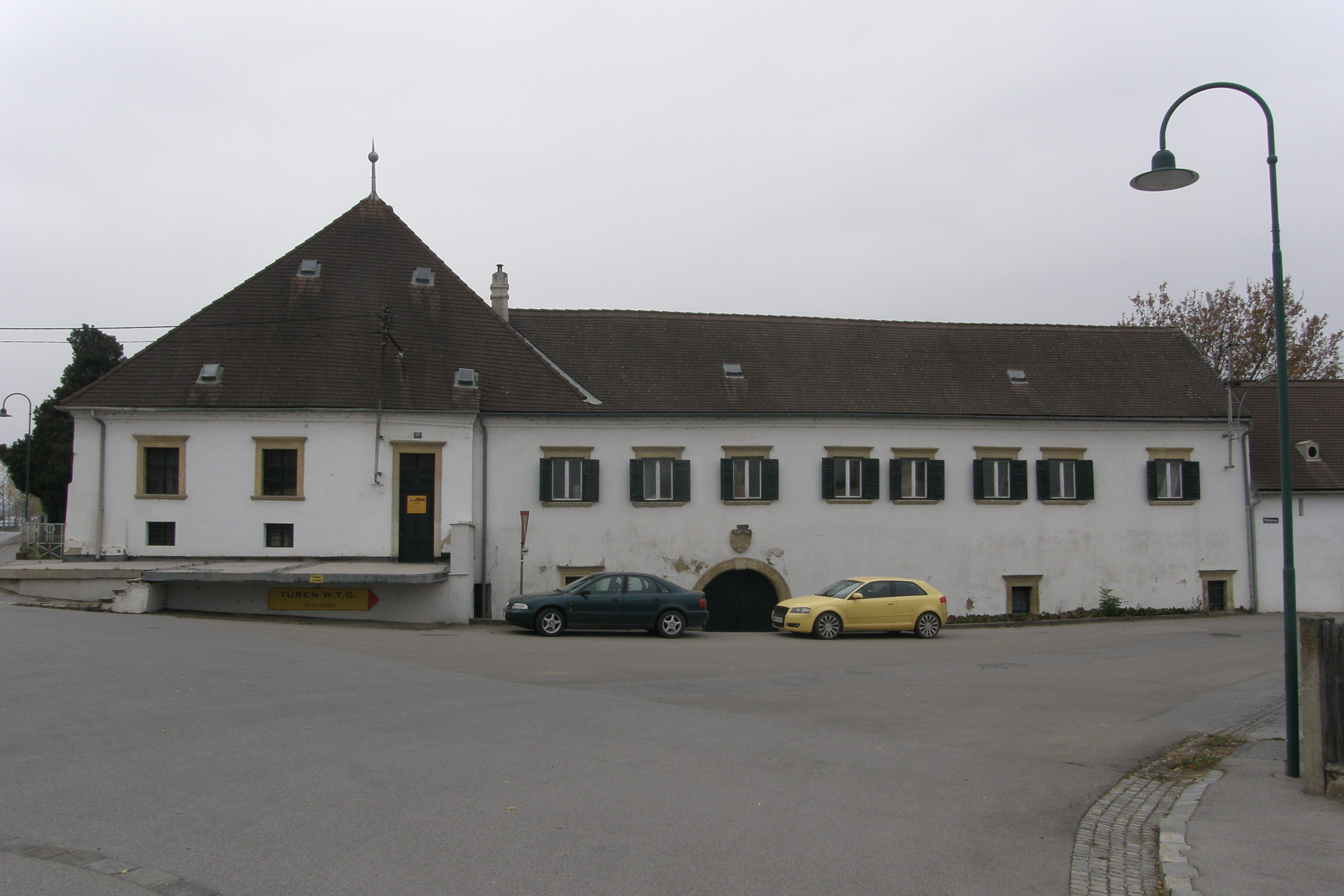 Voglsangmühle